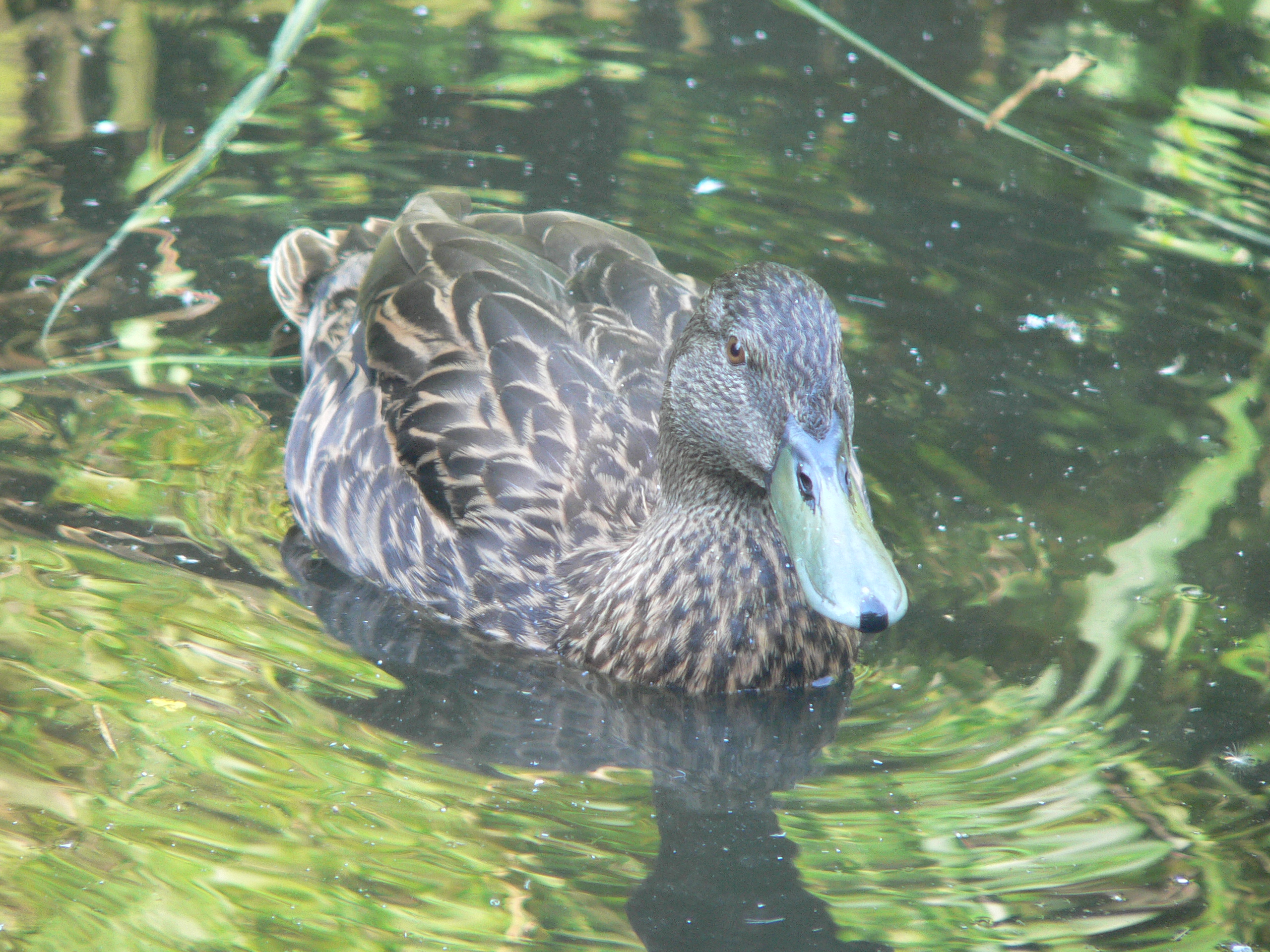 Madagaskarente